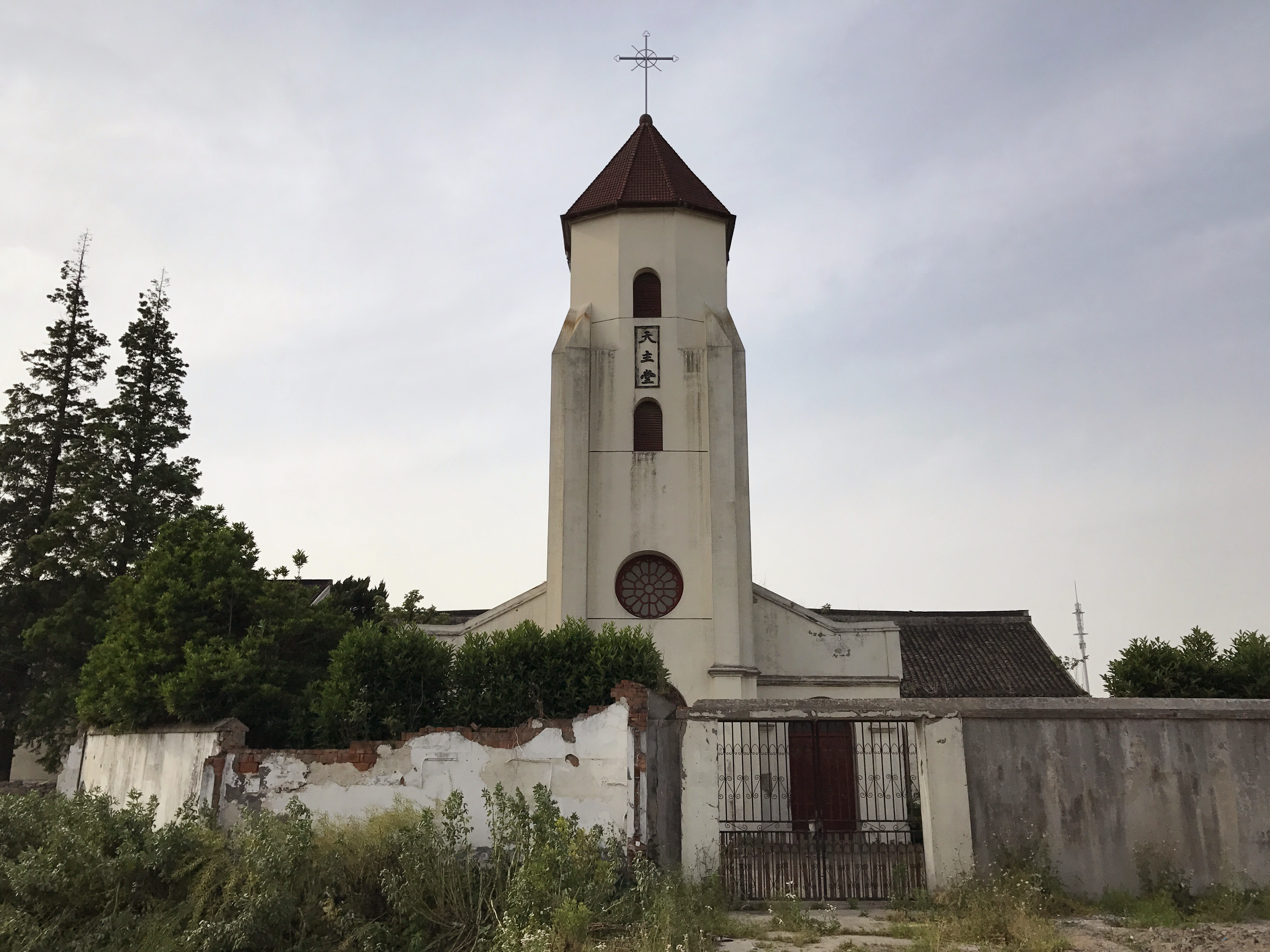 张朴桥圣母无原罪始胎堂 松江区佘山镇张朴村